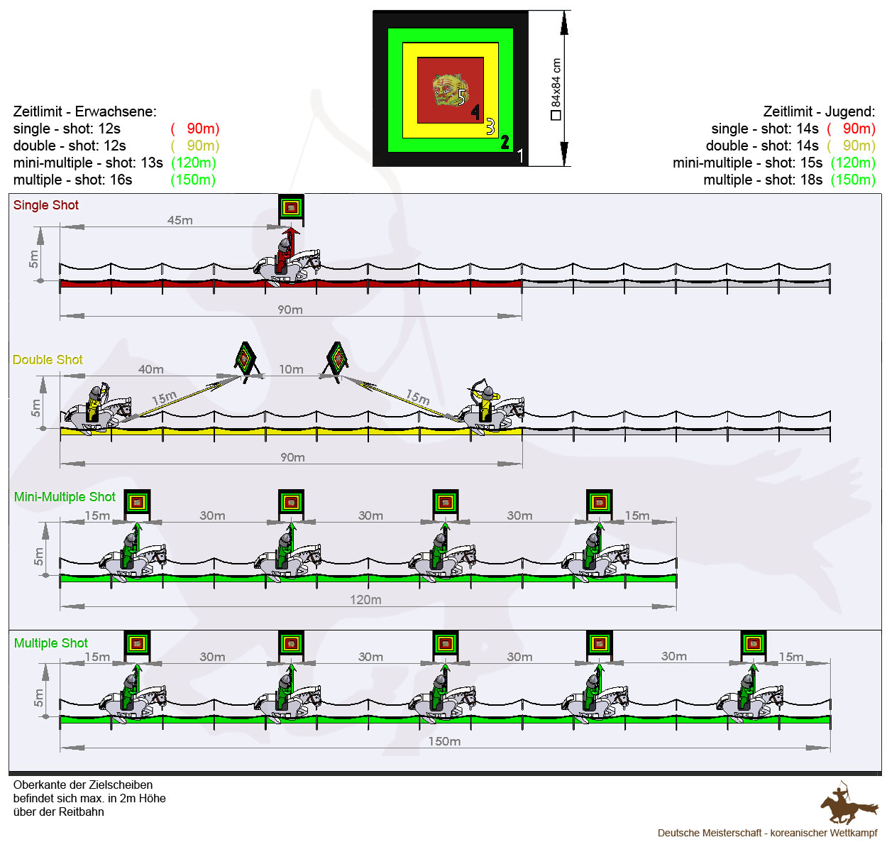 Es werden die vier Varianten des Koreanischen Wettkampfes wie in Europa üblich gezeigt, Stand 2012